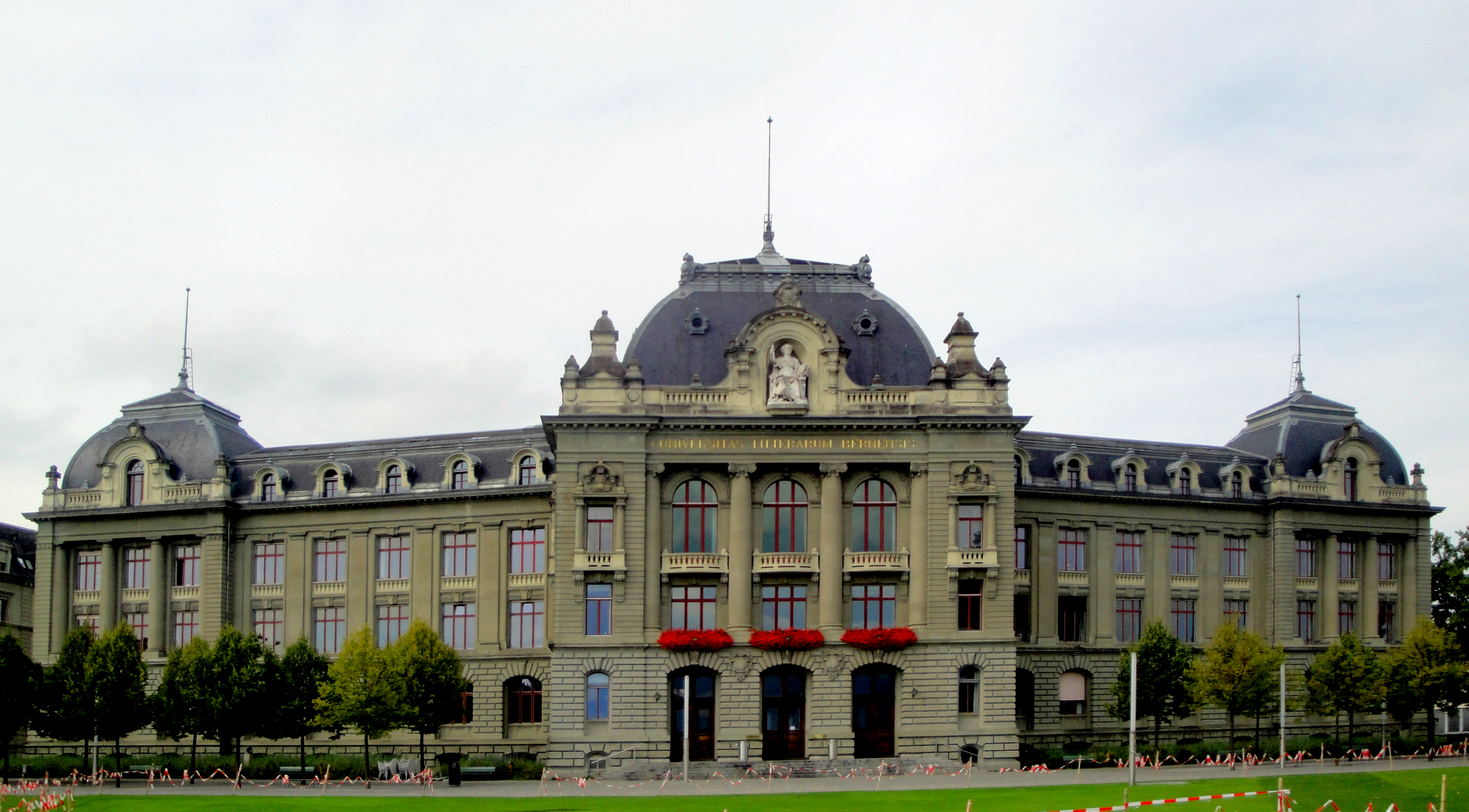 Bern, Hauptgebäude der Universität Bern (Südseite)